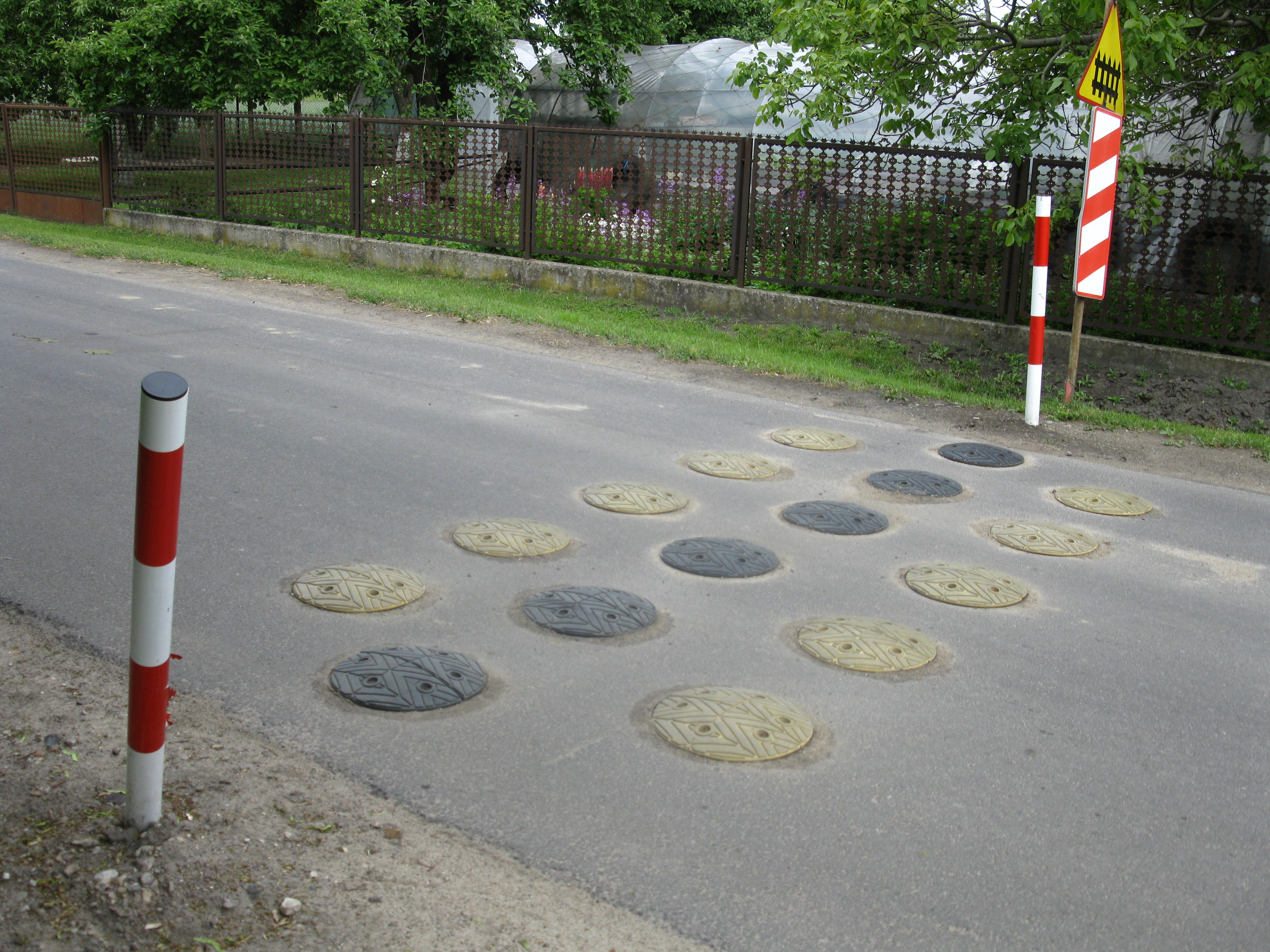 Próg zwalniający w Złotnikach kolo Poznania